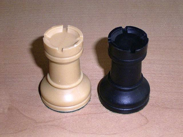 Turm (Schachfigur)